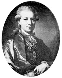 Carl Fredrik Fredenheim (1748-1803)